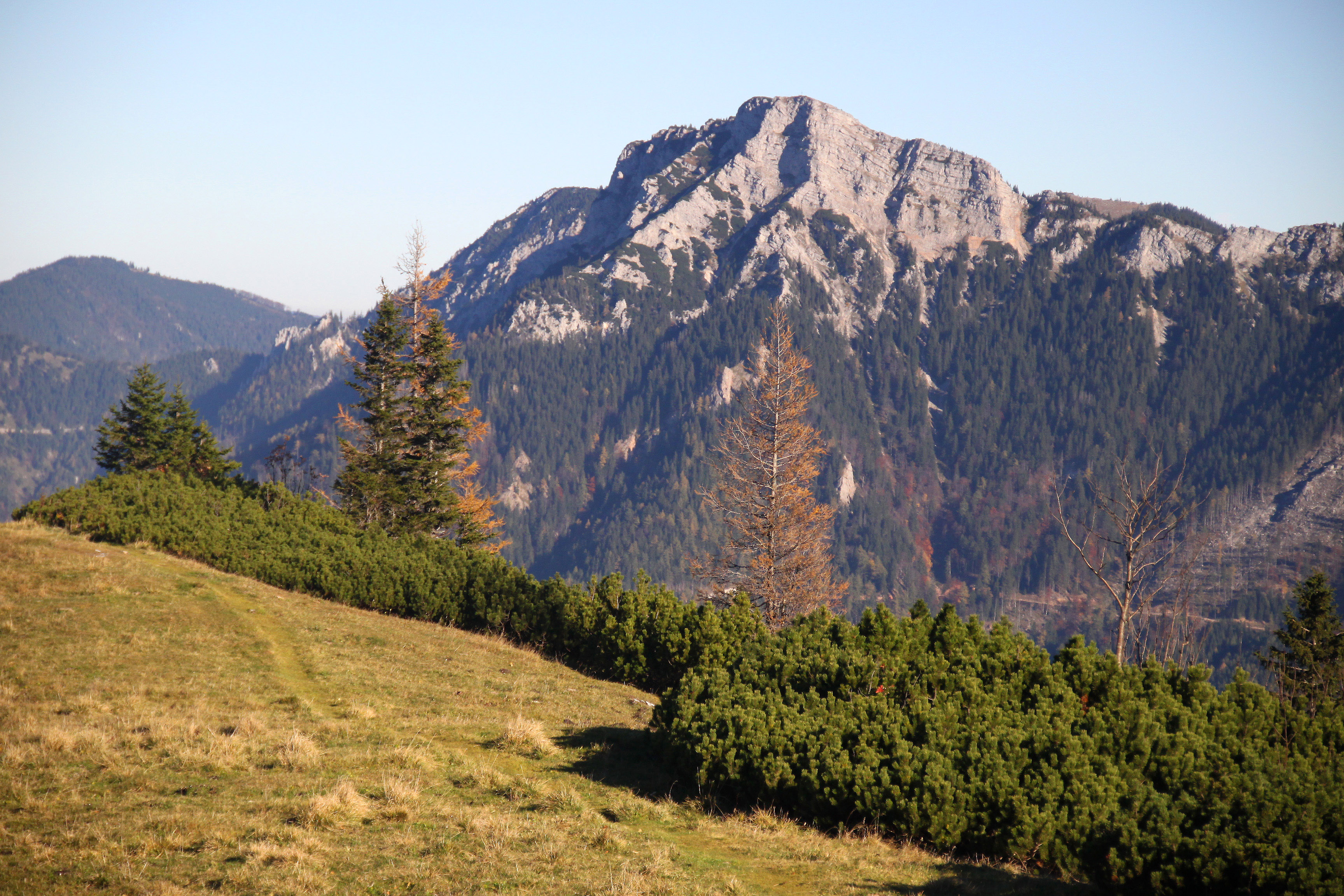 Gippel von Westen (Göllerwiese)